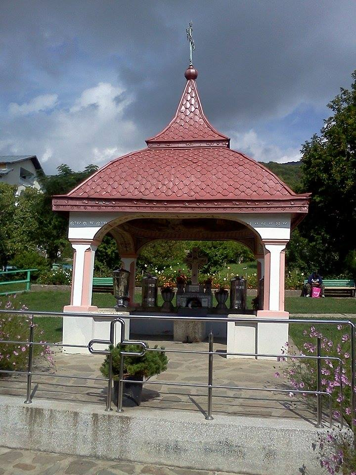 Fântână 03